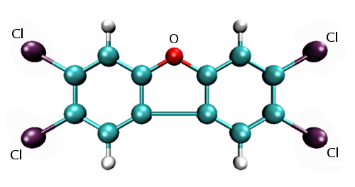 Polychlorodibenzofurane